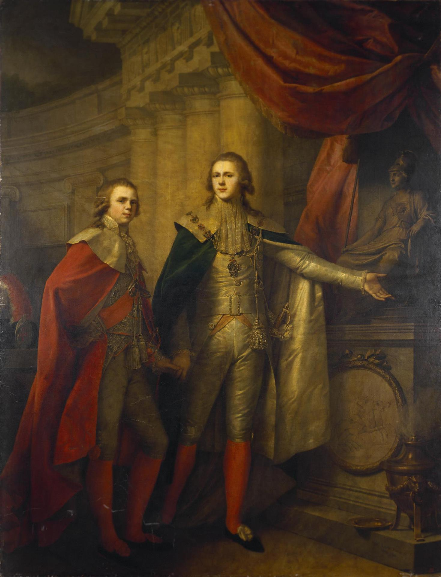 Иоганн Баптист Лампи Старший. Портрет великих князей Александра и Константина Павловичей. 1795 (Государственный Эрмитаж, Петербург)